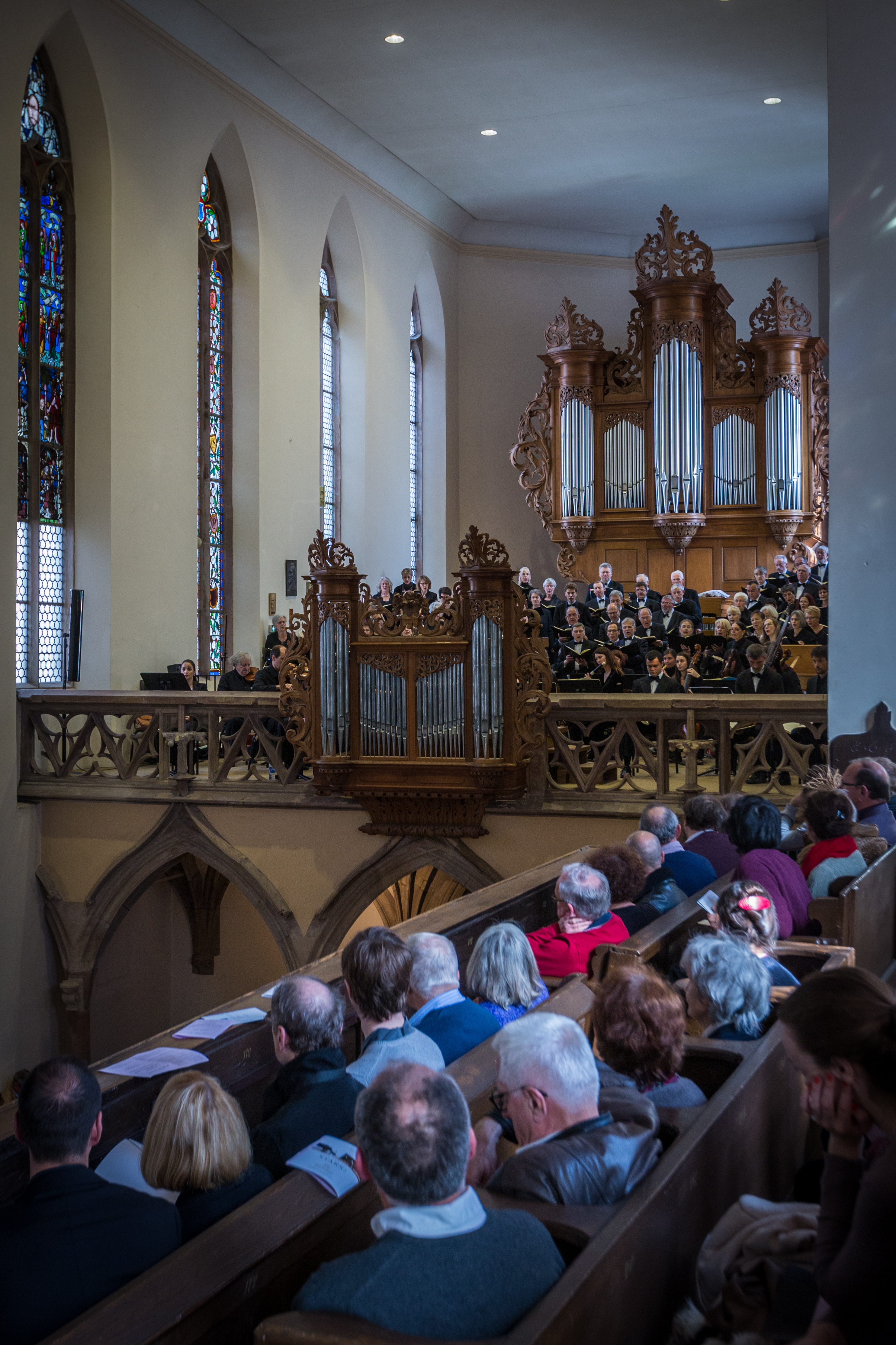 Concert du vendredi Saint, chœur de Saint Guillaume Strasbourg 18 avril 2014.